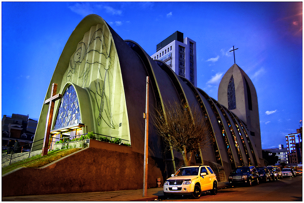 Fundada en 1959. Está ubicada en la calles 21 de la zona de Calacoto, Zona Sur de la ciudad de La Paz.